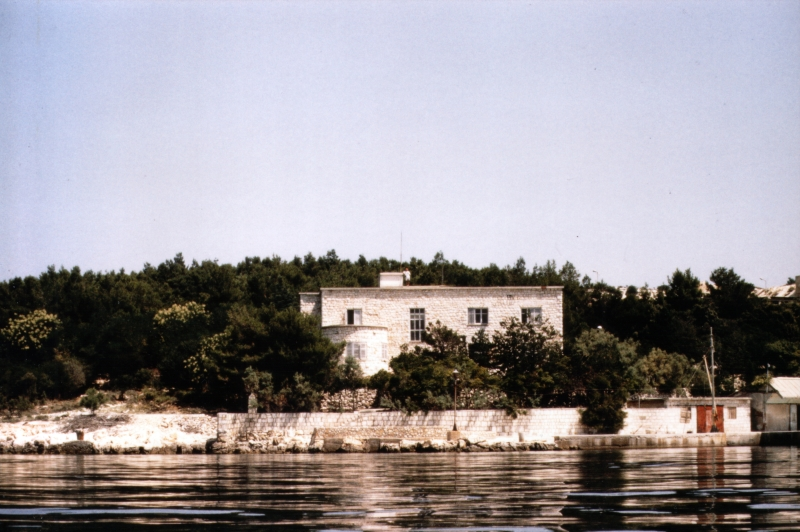 Goli otok, Croatia